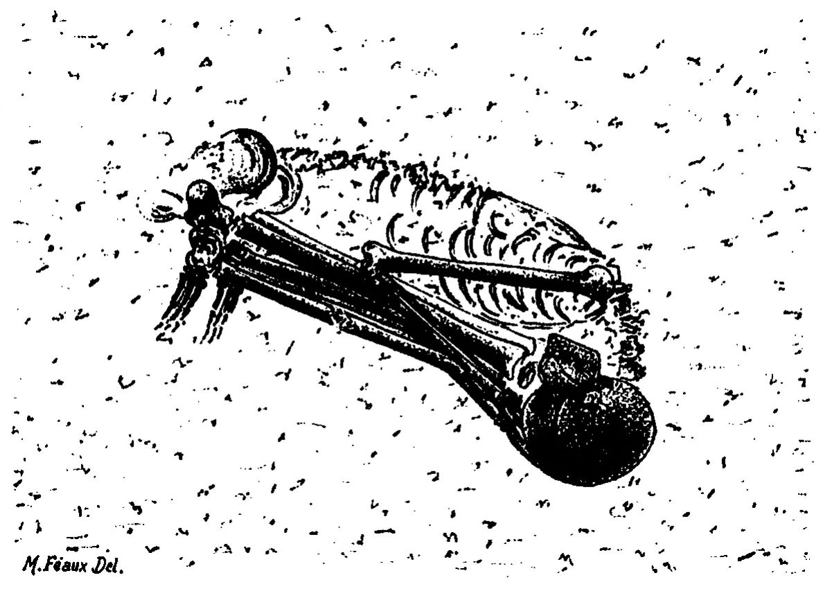 Hardy, Michel (1891). La station quaternaire de Raymonden à Chancelade (Dordogne) et la sépulture d'un chasseur de rennes" Página 48: Hombre de Chancelade en postura fetal, según se encontró.